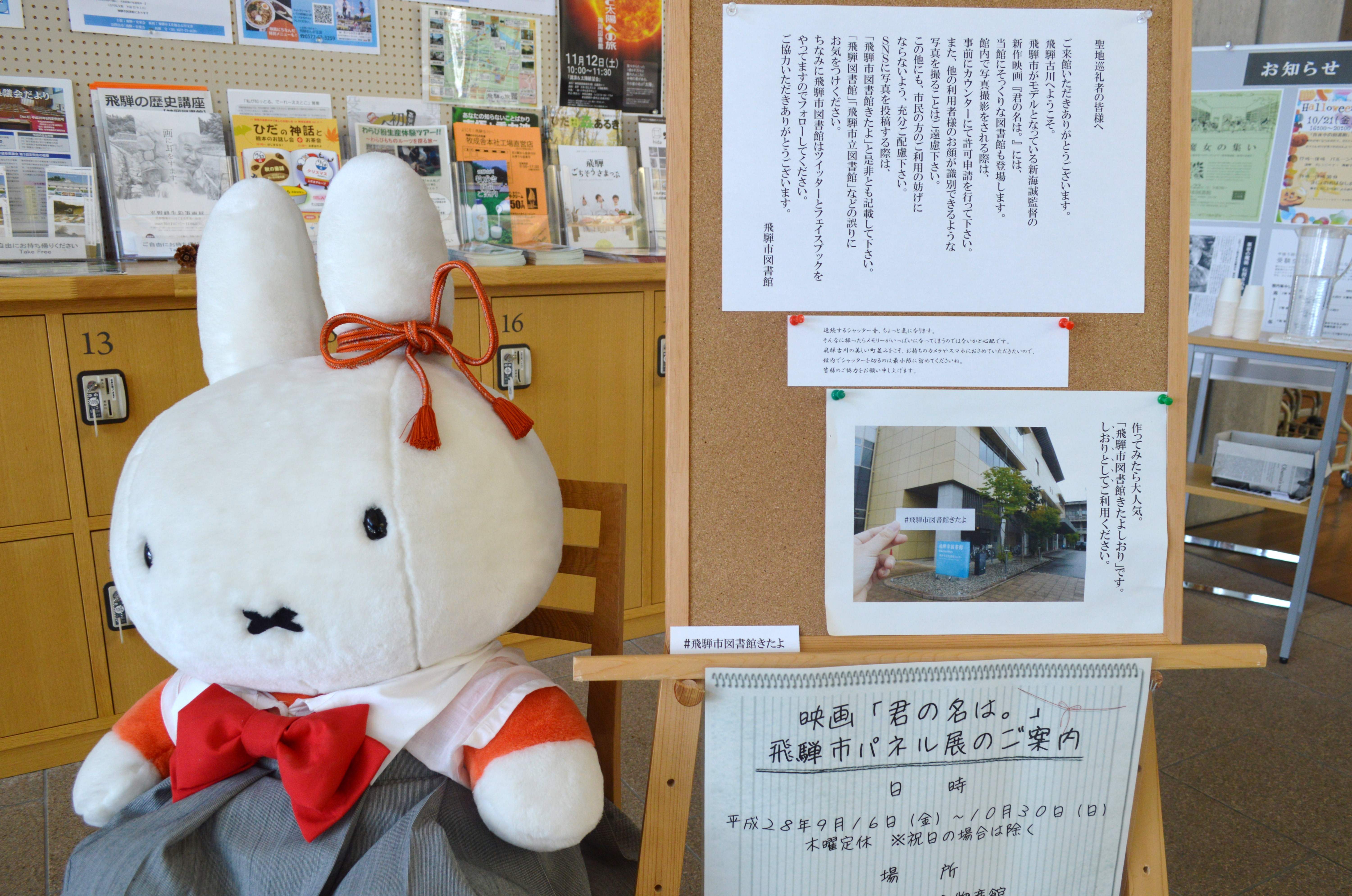 飛騨市図書館。入口にある『君の名は。』聖地巡礼者向けの注意書き。